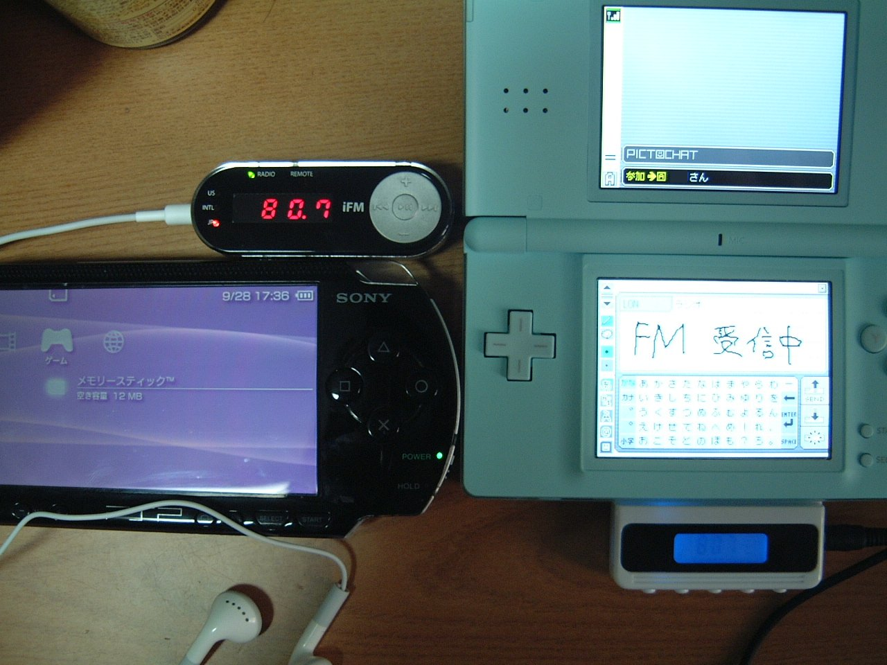 携帯ゲーム機におけるFM放送受信装置